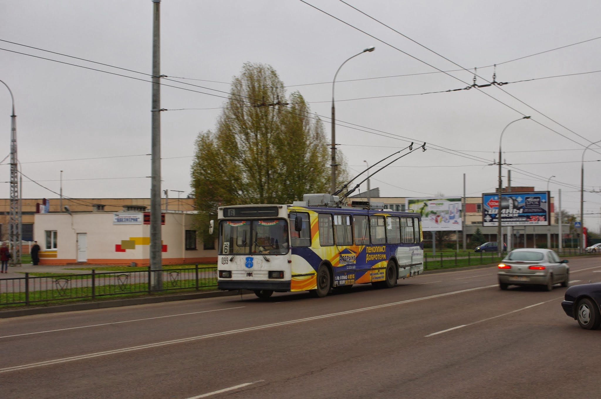 Kavaliova, Brest, Belarus